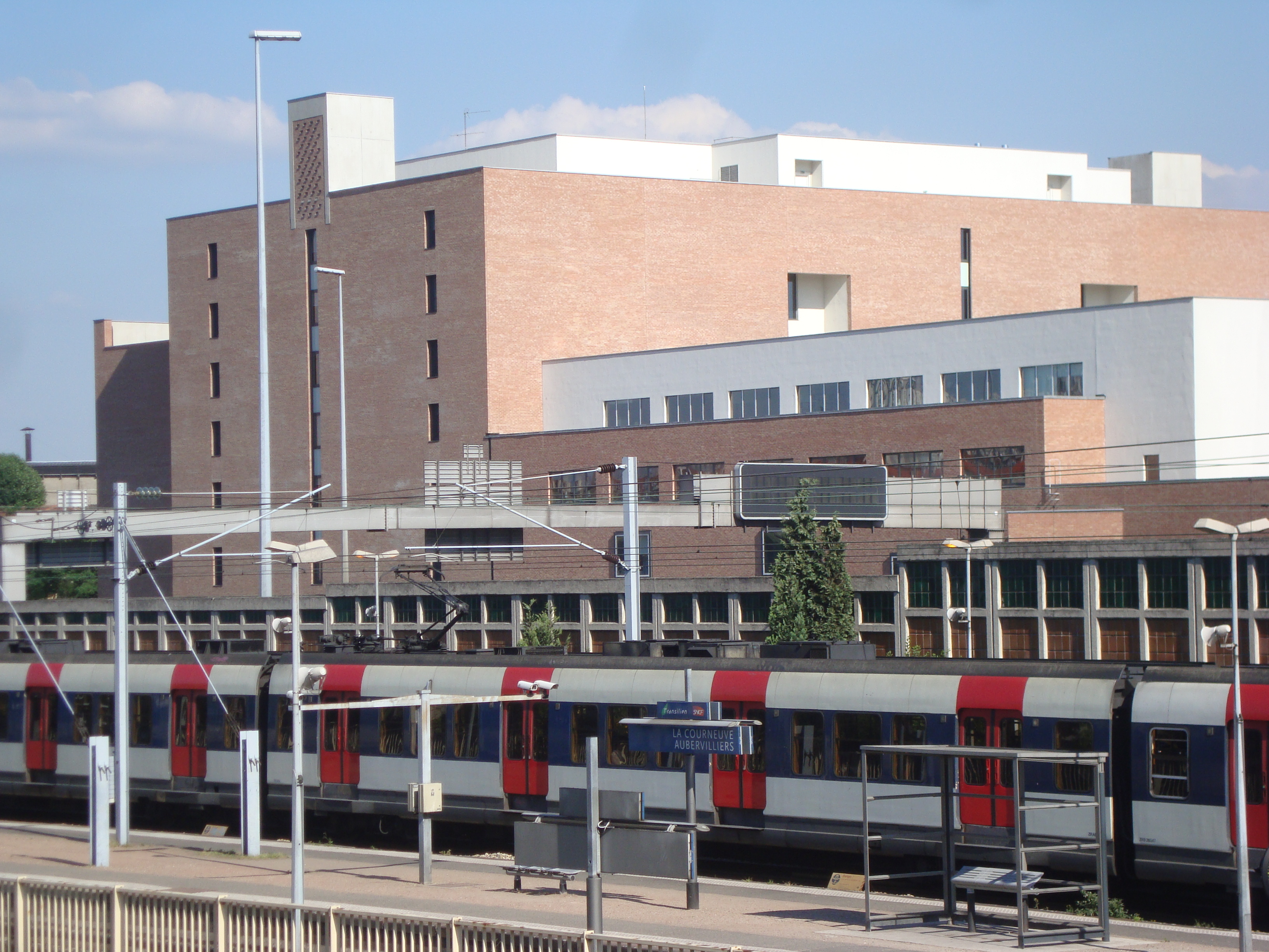 Vue des Archives du Ministère des Affaires étrangères depuis la rue Victor Hugo. Au premier plan la gare RER.